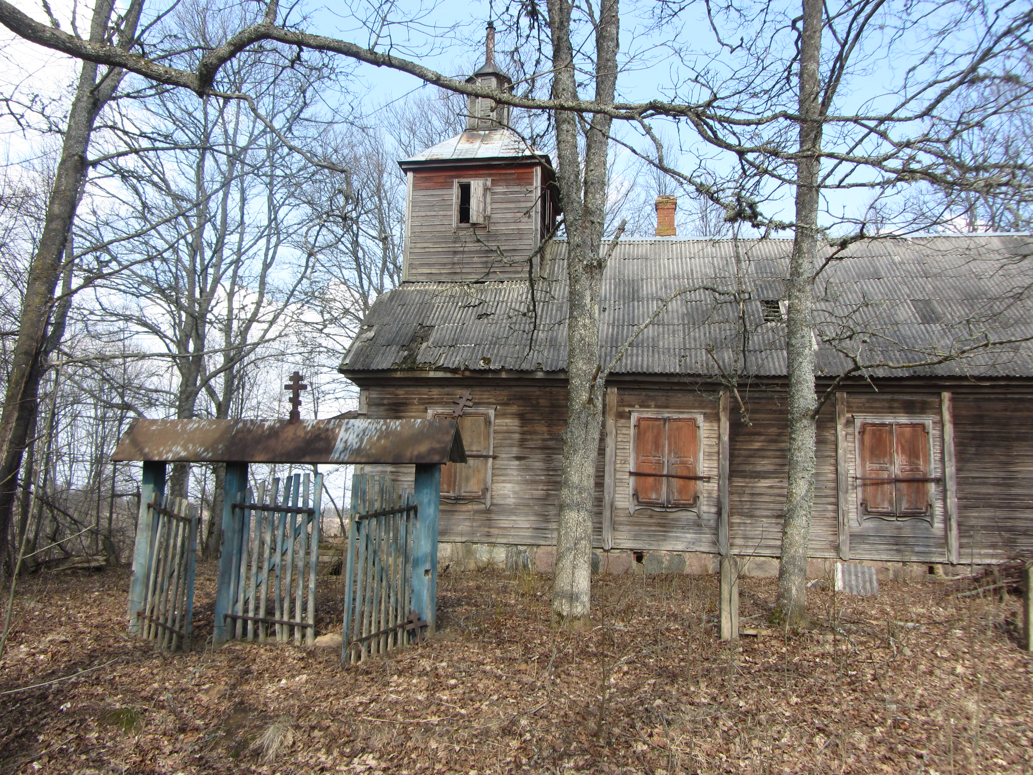 Aukštakalniai 30258, Lithuania